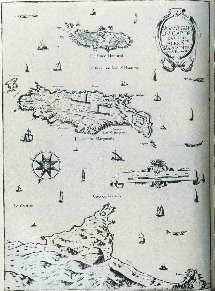 La reprise des îles de Lérins en 1637